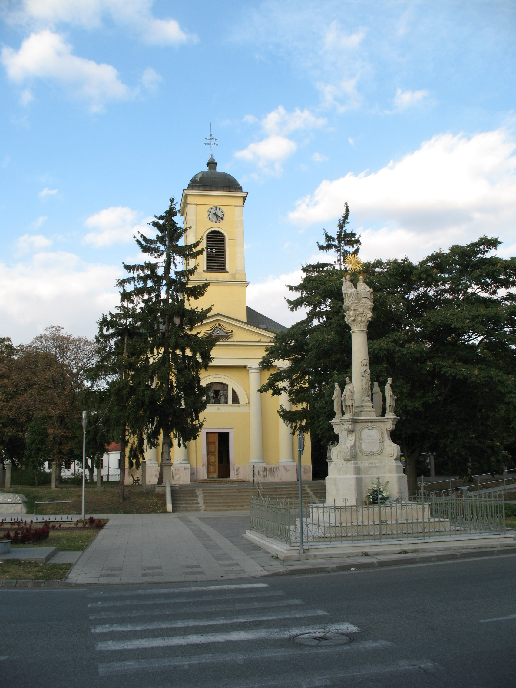 Vágsellye templom